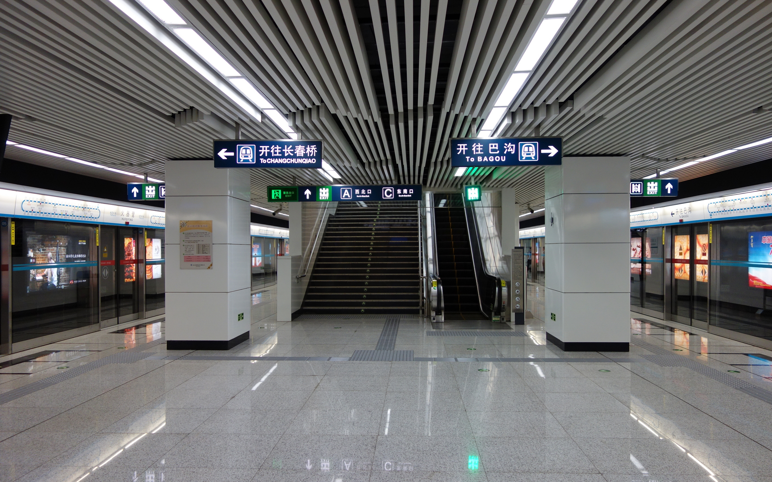 火器营站站台